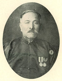 Bân-lâm-gú: Lū Kiàn-pang 呂建邦